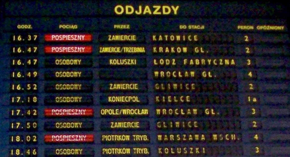 Tablica elektroniczna z rozkładem jazdy